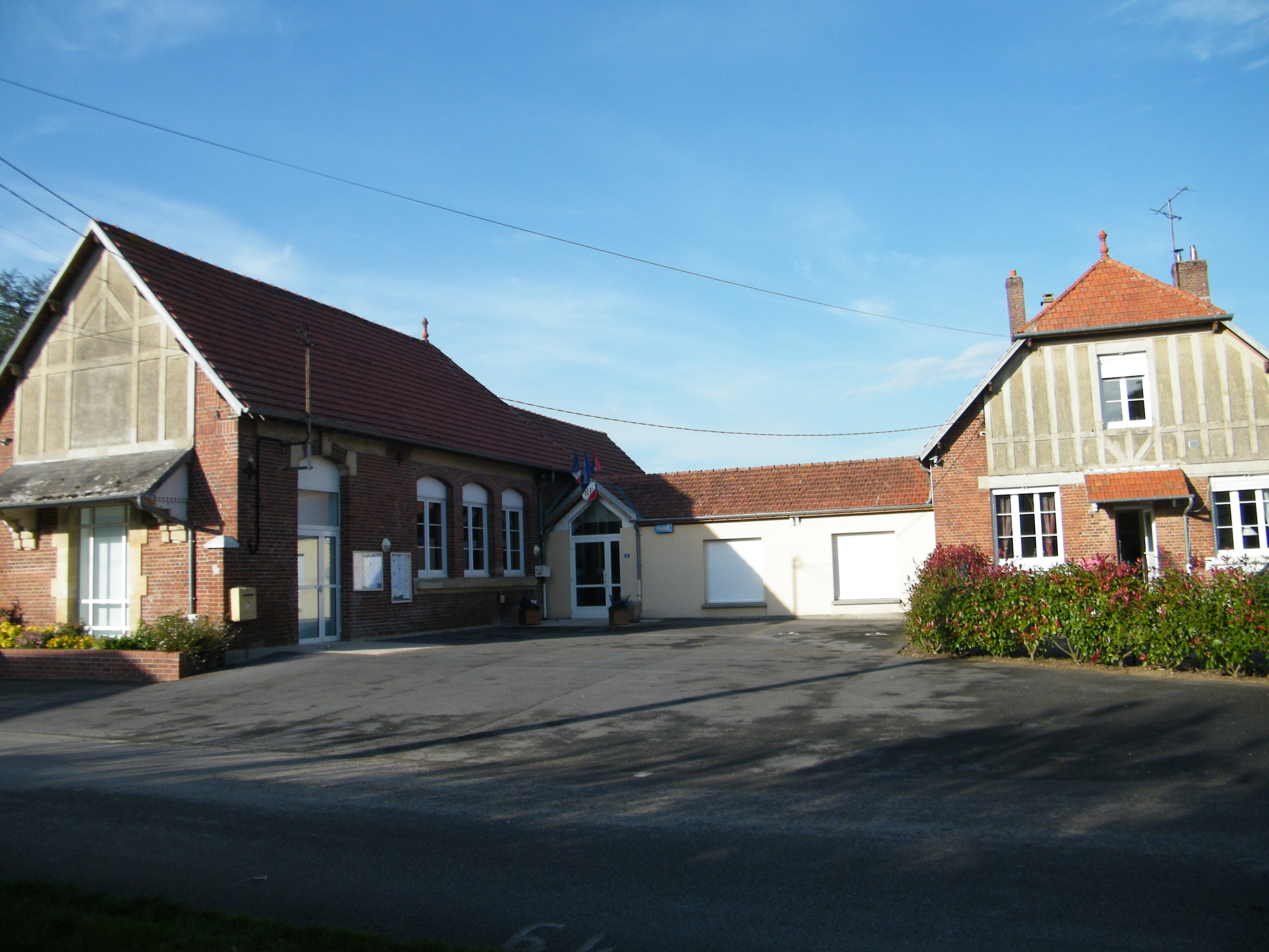 Mairie-école.